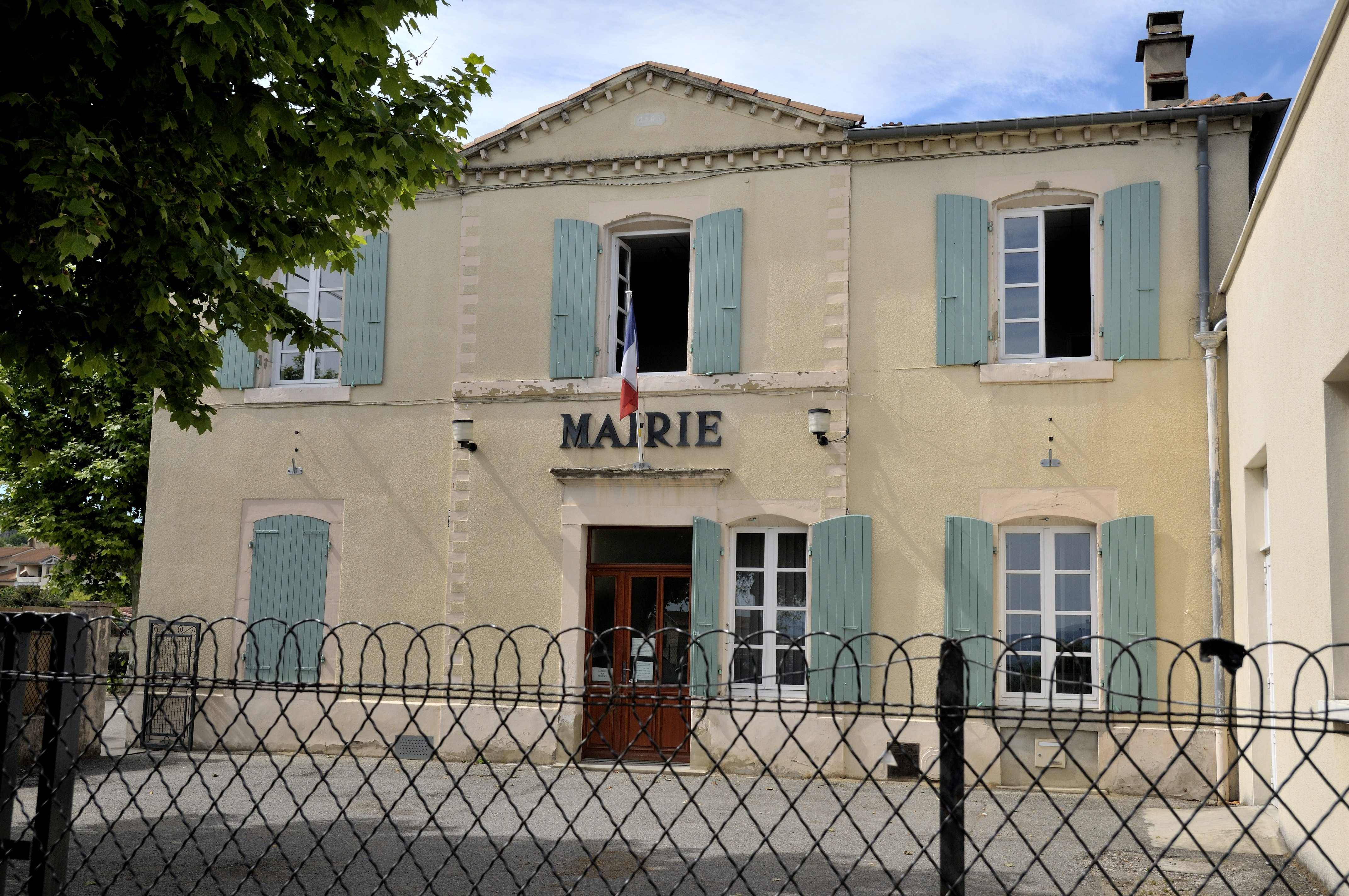 la mairie